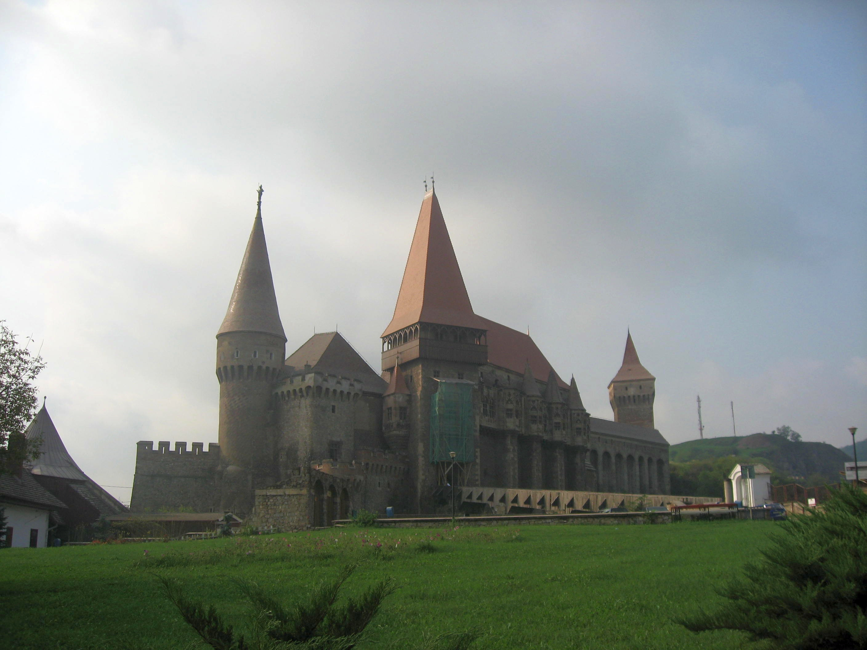 Hrad Hunedoara